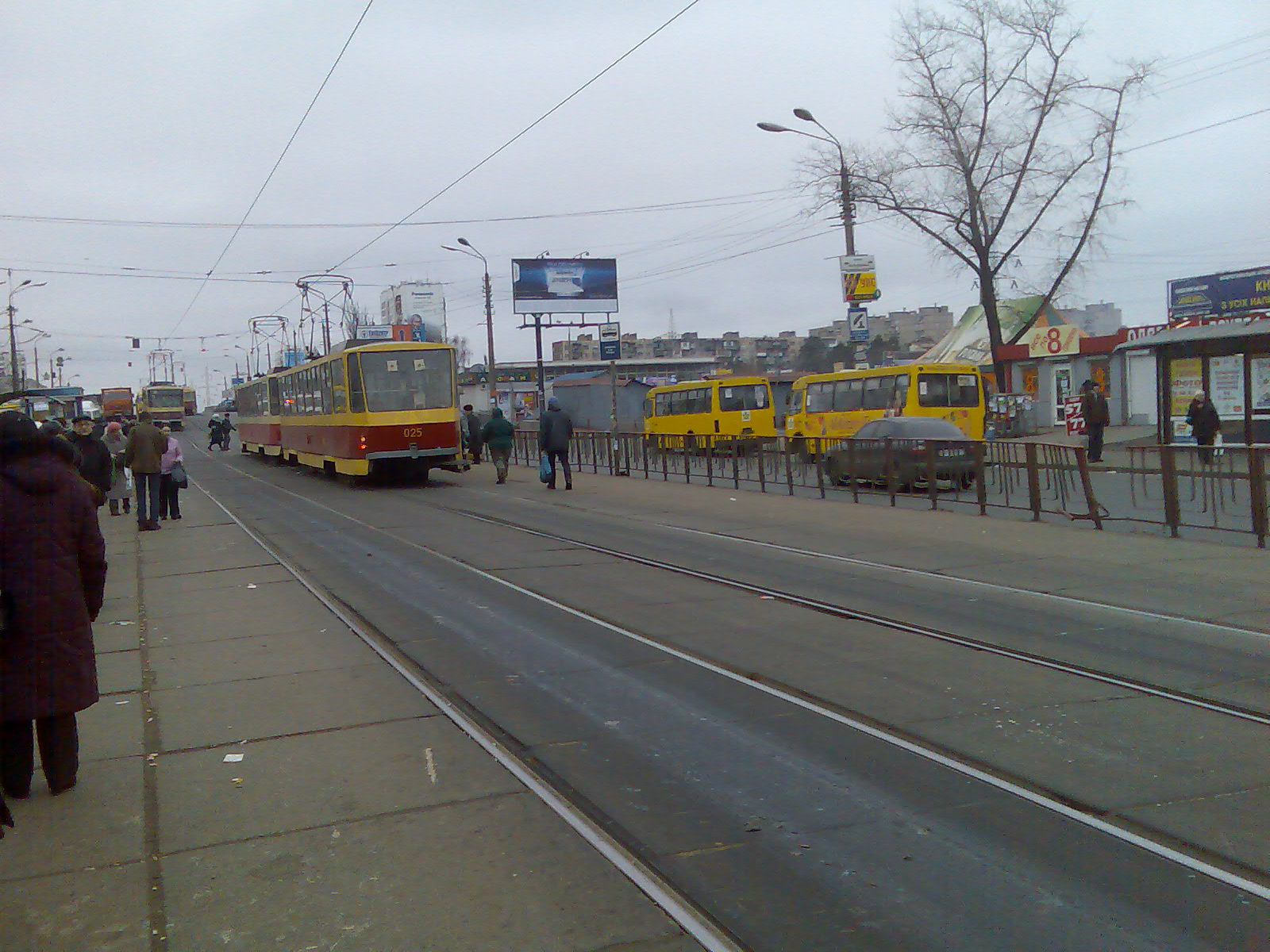 Сцепка трамваев Tatra T6B5 (№№ 024-025) 33-го маршрута на остановке «Станция метро „Черниговская“»